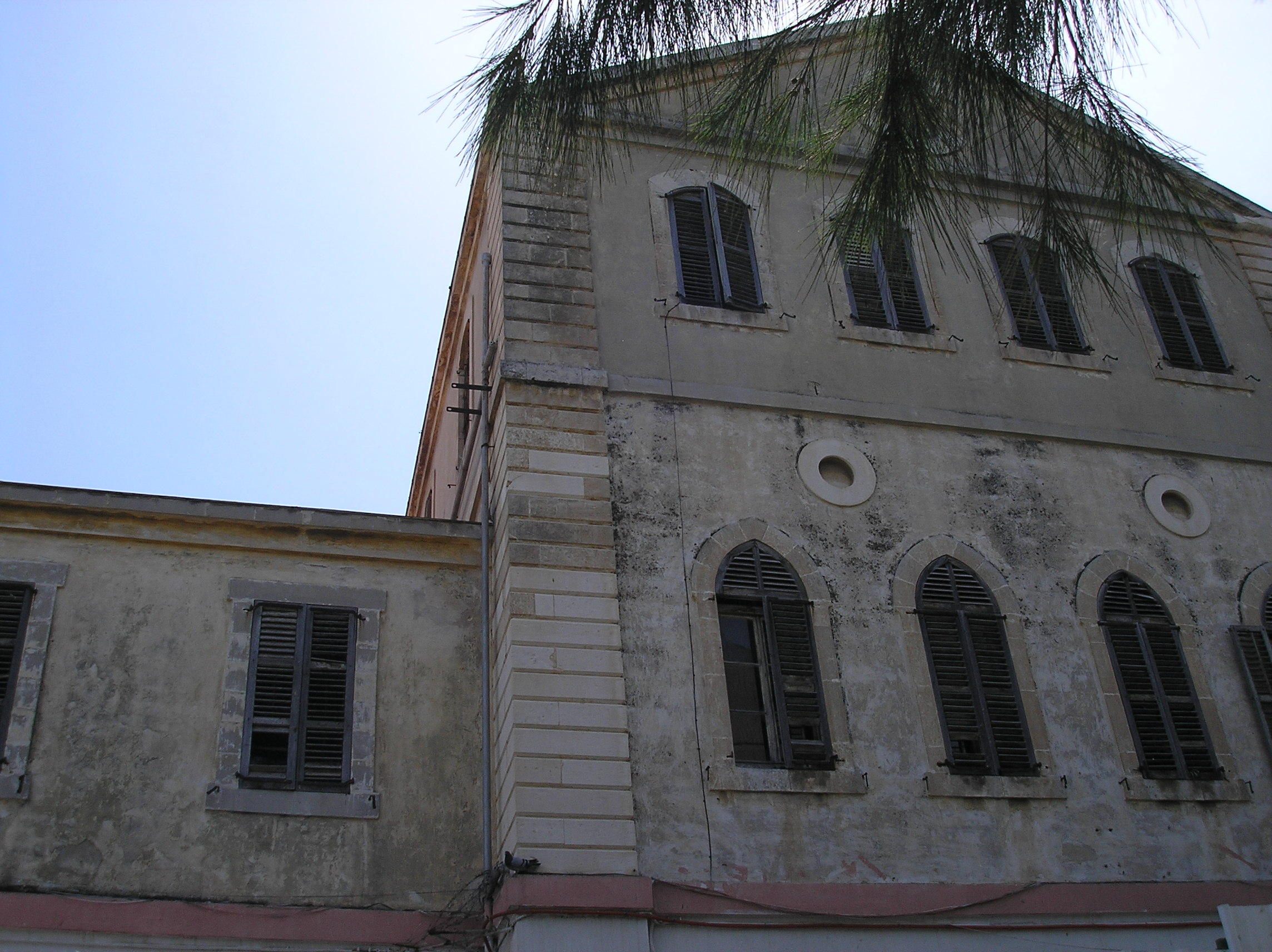 Beit Hardegg בית הרדג